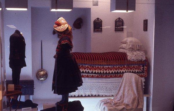 Fotografía. Exposición permanente, cuando el Museo estaba instalado en el Palacio de Godoy.